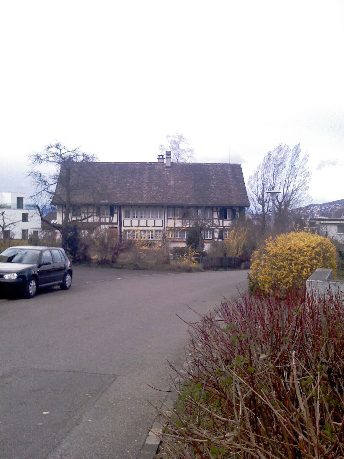 Old house in Zollikon (Fohrbachstrasse) - Malnova domo en Zollikon